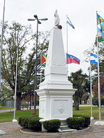 Réplica en Campana